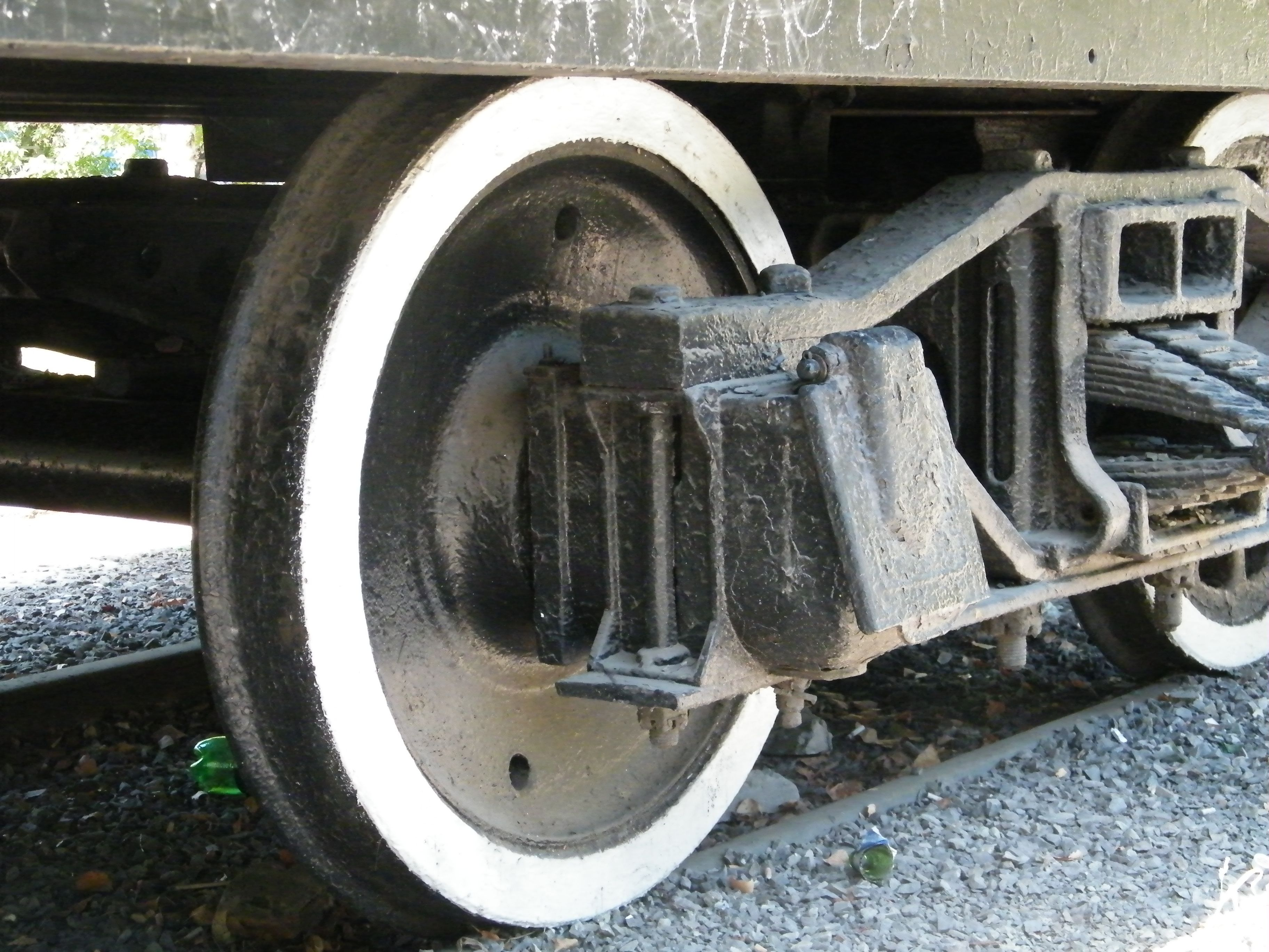 Russian locomotive Ел-629